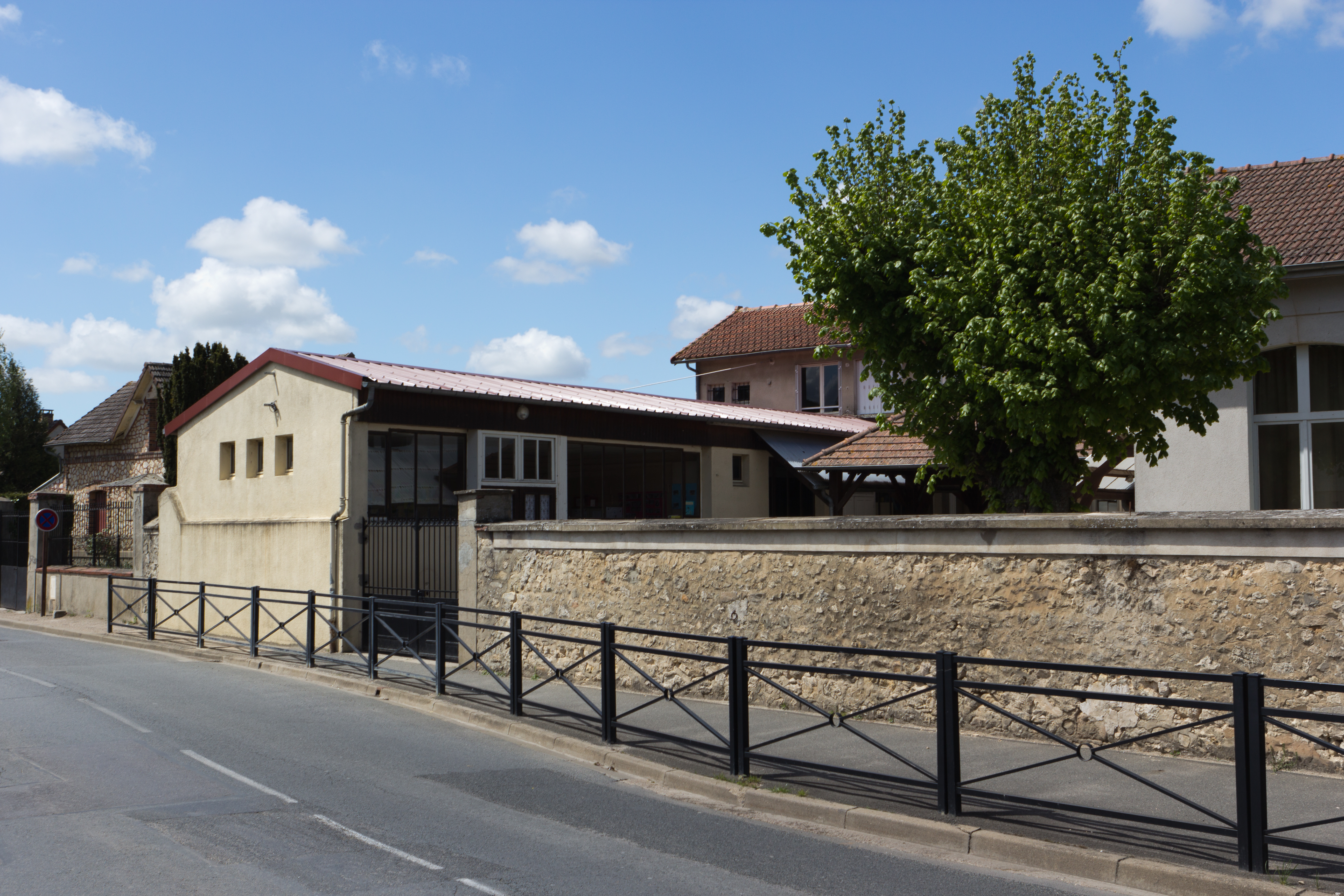 Ecole de D'Huison-Longueville, D'Huison-Longueville, département de l'Essonne, France.